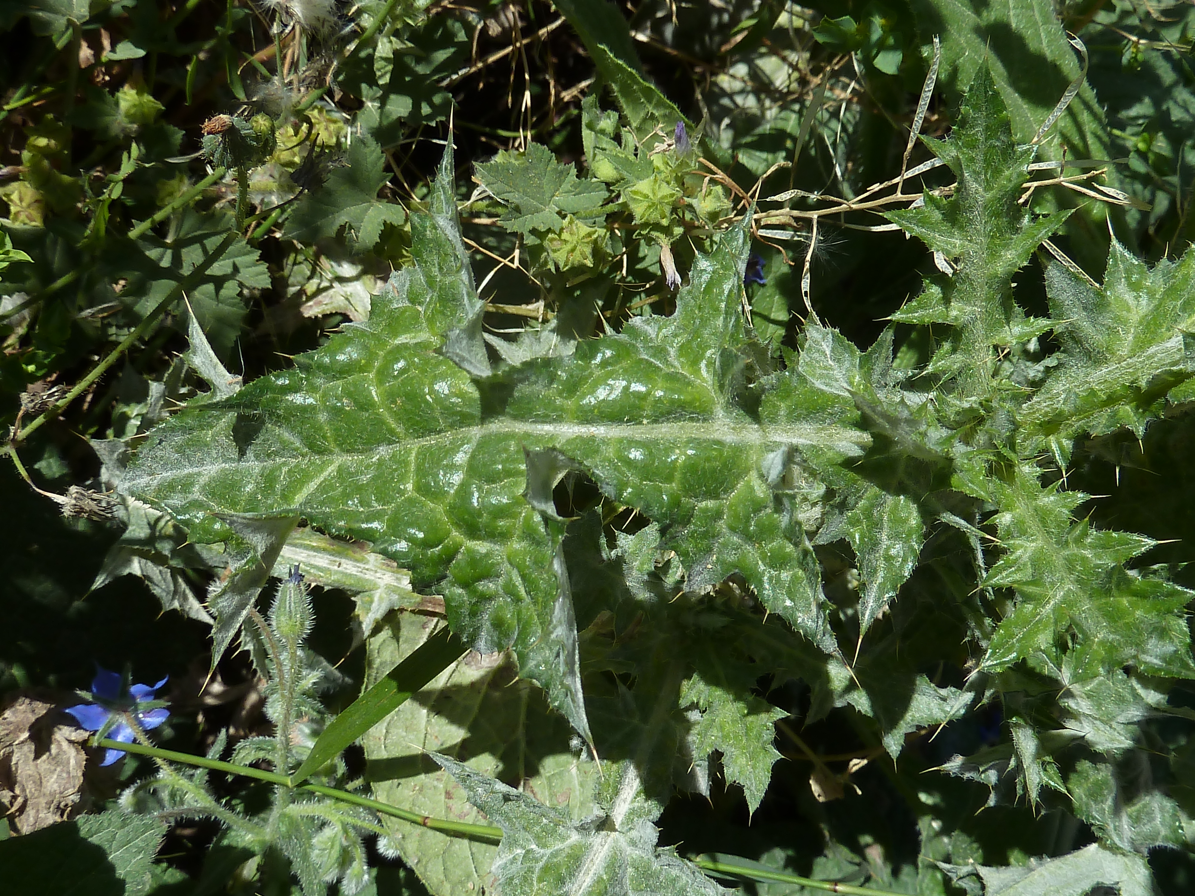 Carduus pycnocephalus (Cardo, cardo borriquero, cardo negro) - Hoja caulinar: haz. - Descampado circa Biblióteca, Albatera (Provincia de Alicante, Espàña).